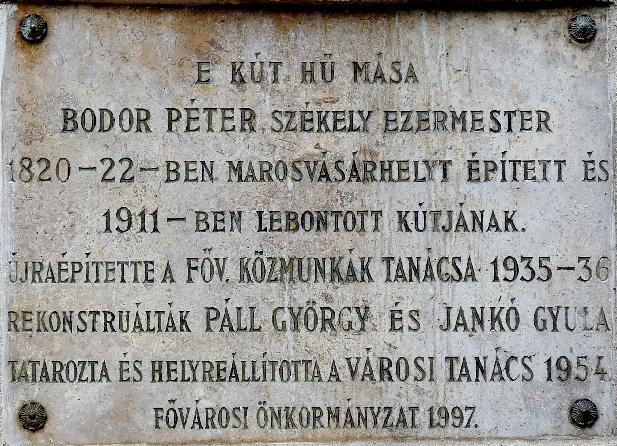 Bodor Péter székely ezermester, mechanikus (1788-1849) emléktáblája az általa tervezett és épített marosvásárhelyi zenélő kút másolatán. Budapest, XIII. ker. Margitsziget, Bodor-kút (Zenélő kút)